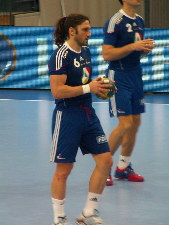 Bertrand Gille durante el Campeonato del Mundo de Balonmano de 2011